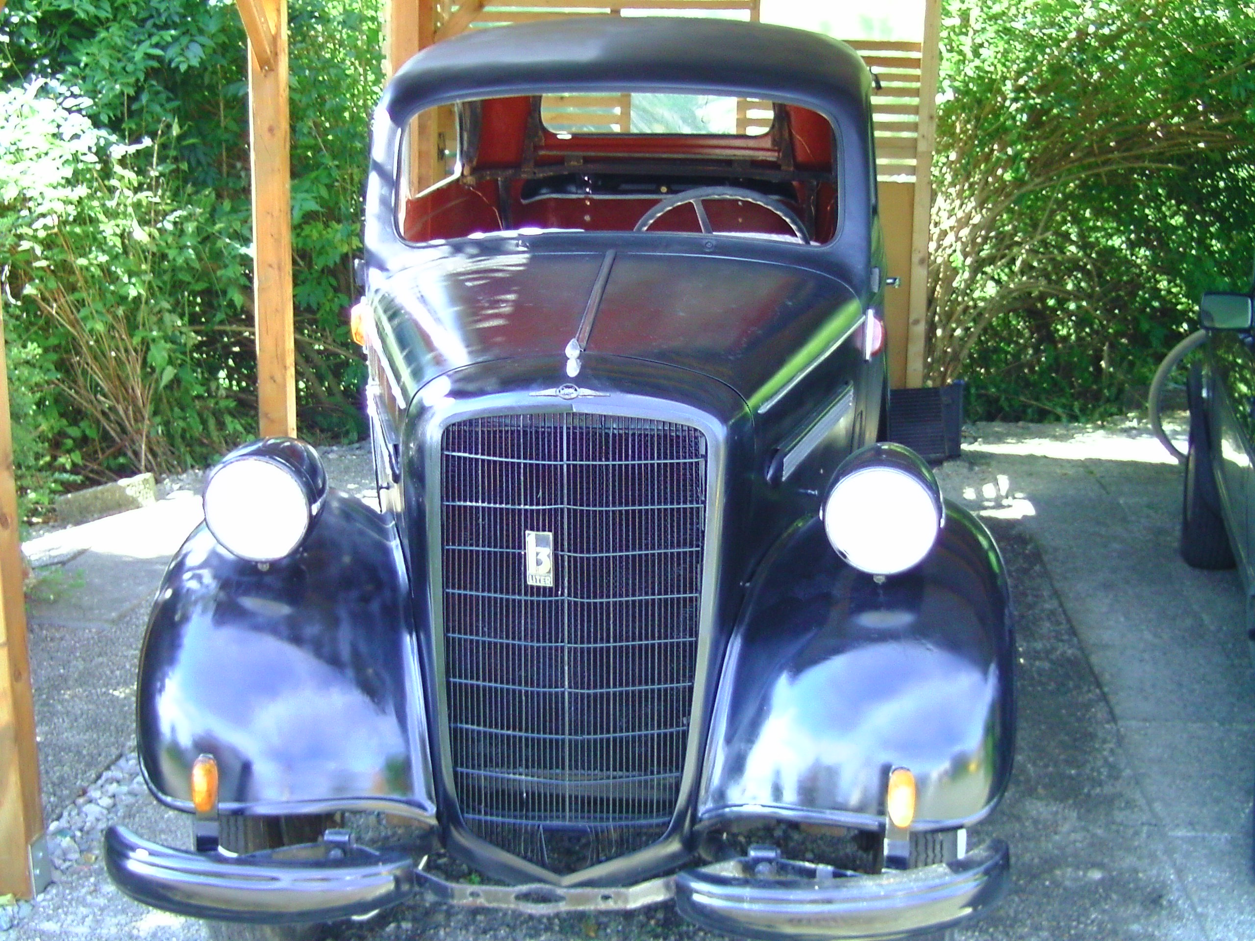 Mein Vorkrieg Opel 1.3ltr. ,Bj 1934,LZ 1397